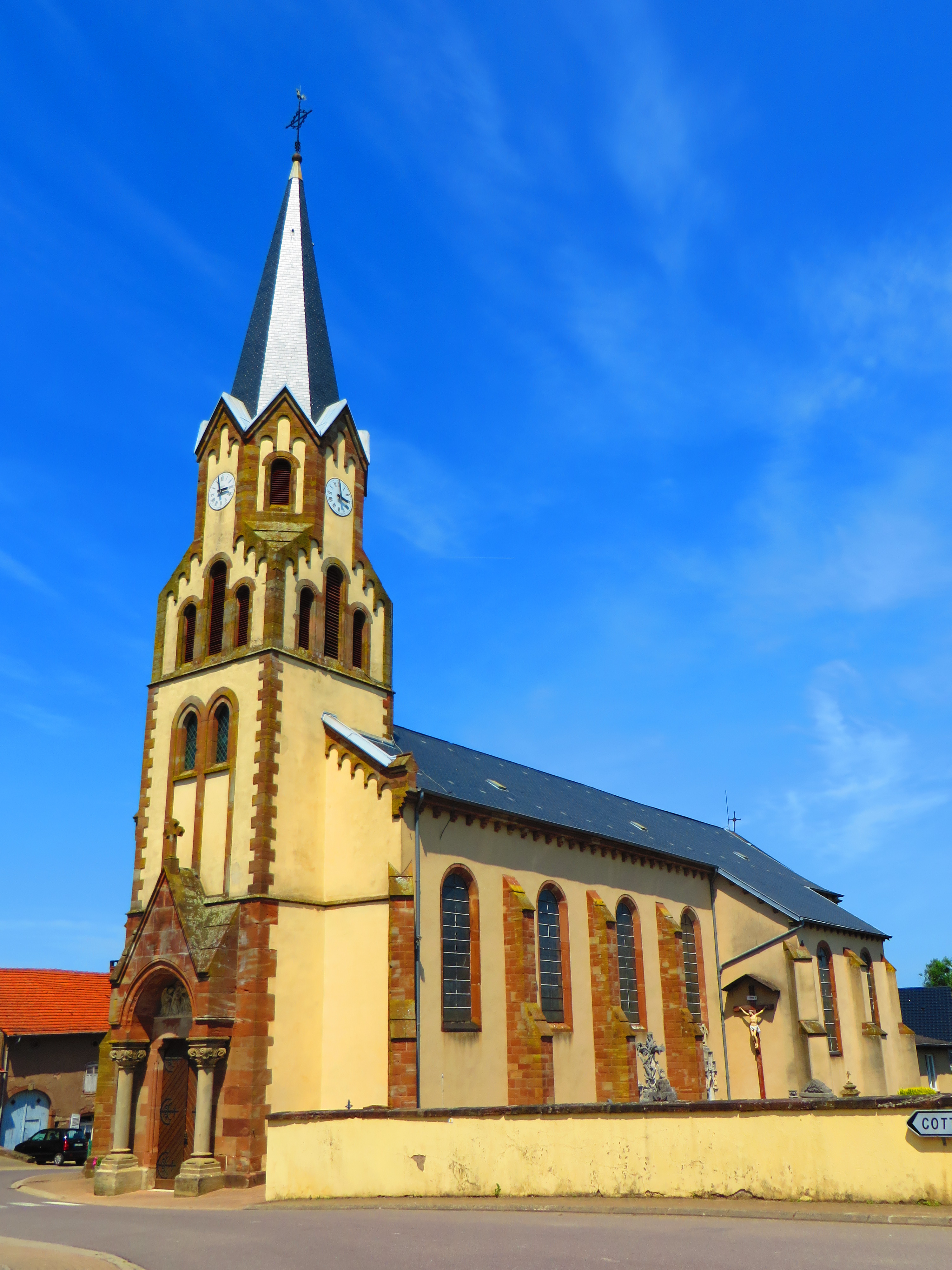 Schwerdorff eglise